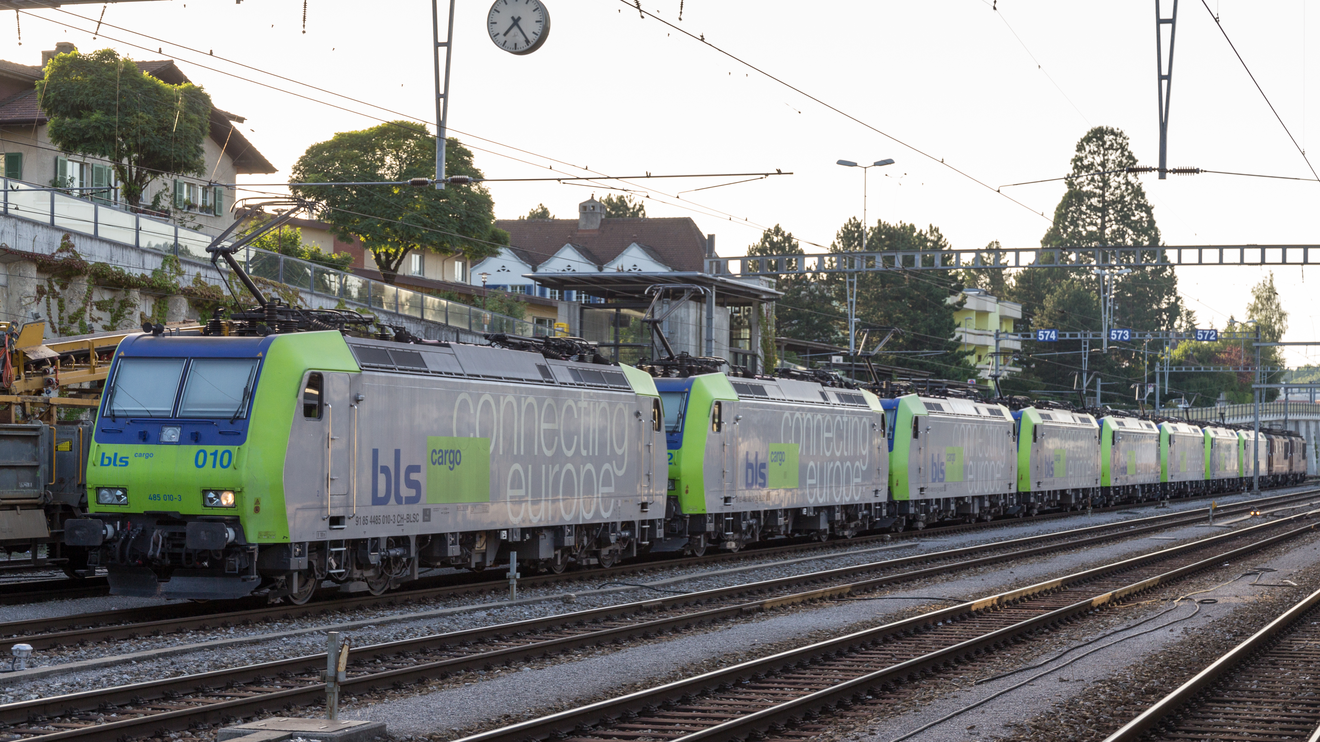 Lokzug bestehend aus 8 BLS Re485 und 2 BLS Re 4/4 in Spiez BE